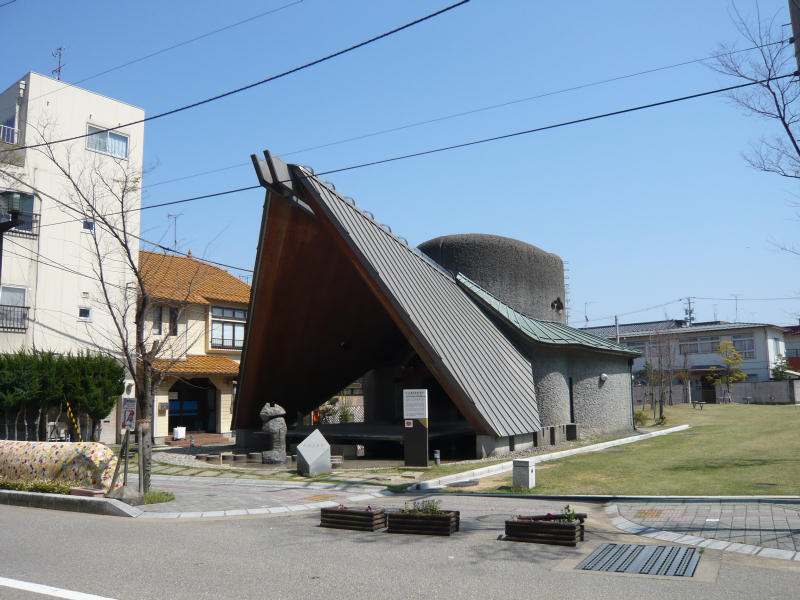 片山津温泉の源泉